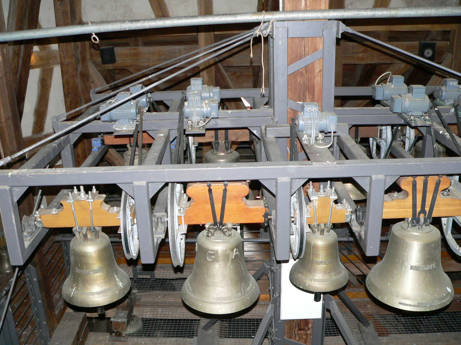 Glockenmuseum Herrenberg Zimbelgeläut